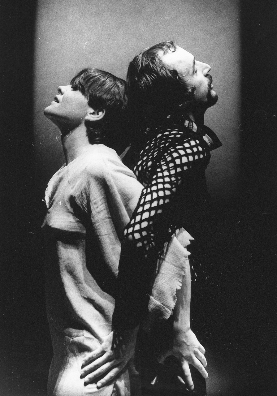 Jobba Gabi és Iglódi István a Szerelmem, Elektra című színházi előadásban. Budapest, 25. Színház.